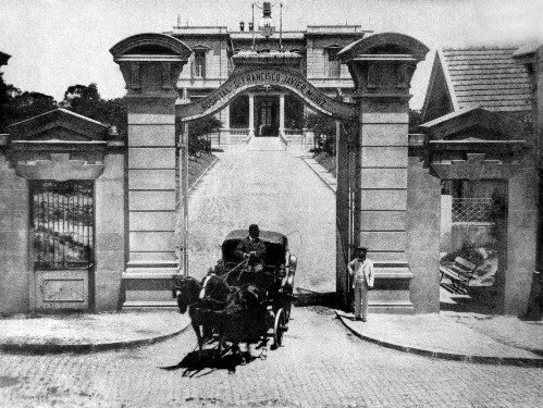 Una ambulancia cruza el portón de entrada del Hospital de Infecciosas "Dr. Francisco J. Muñiz", en la ciudad de Buenos Aires, Argentina.